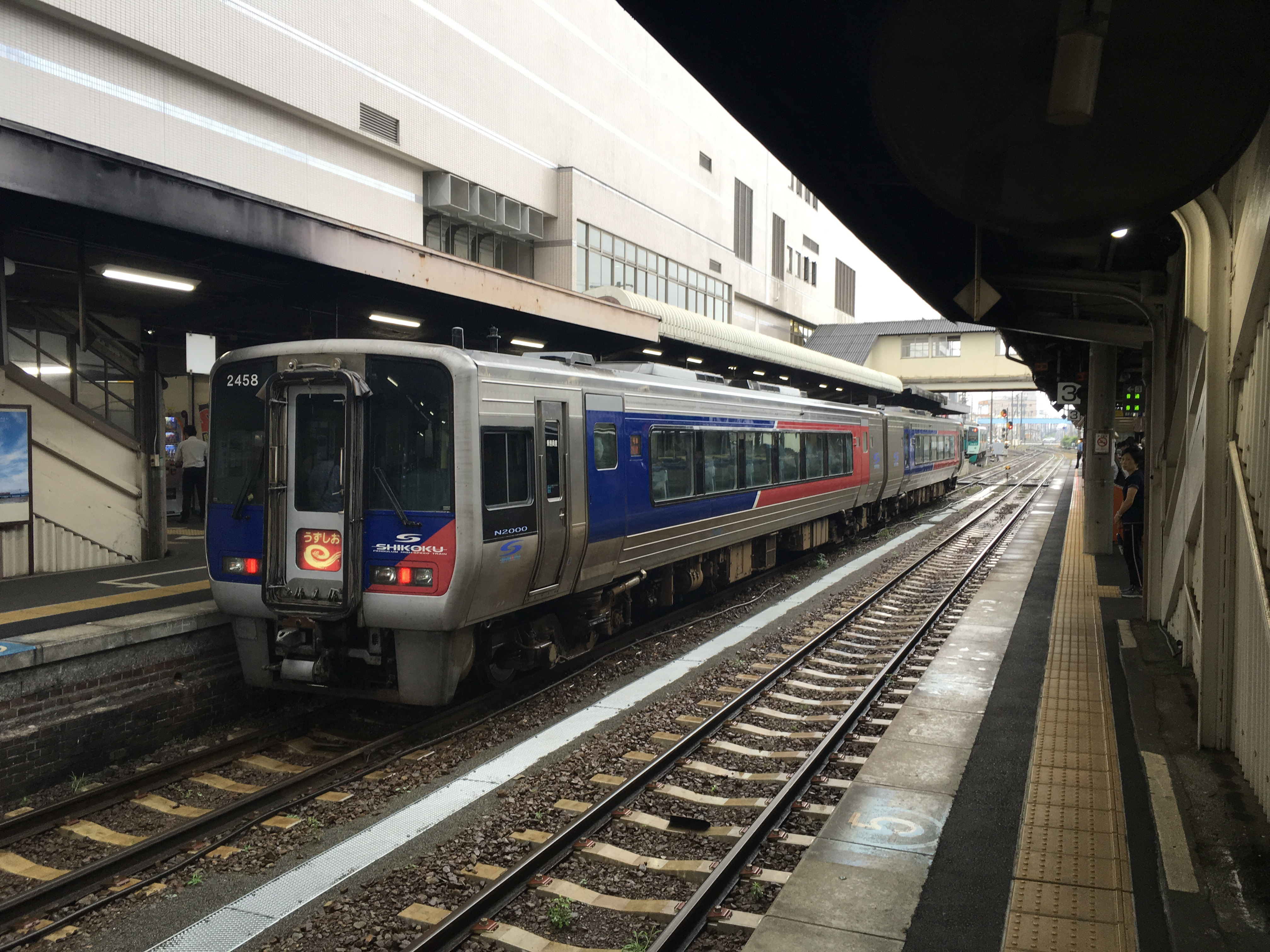 中文（中国大陆）: 停在德岛站站台上的N2000系，特别注意量产先行车N2458在其中